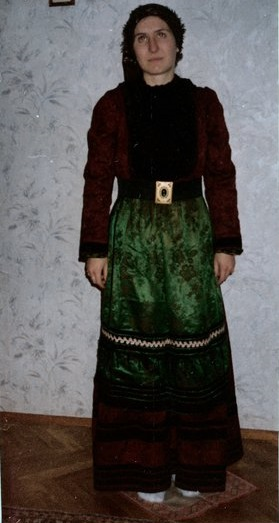 Градската носия от Костур от края на 19 век, характерна за Западна Егейска Македония.